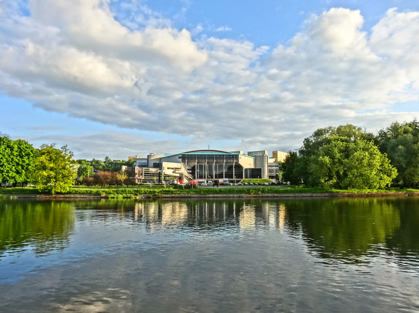 Hala widowiskowo-sportowa Łuczniczka w Bydgoszczy - widok od strony rzeki Brdy